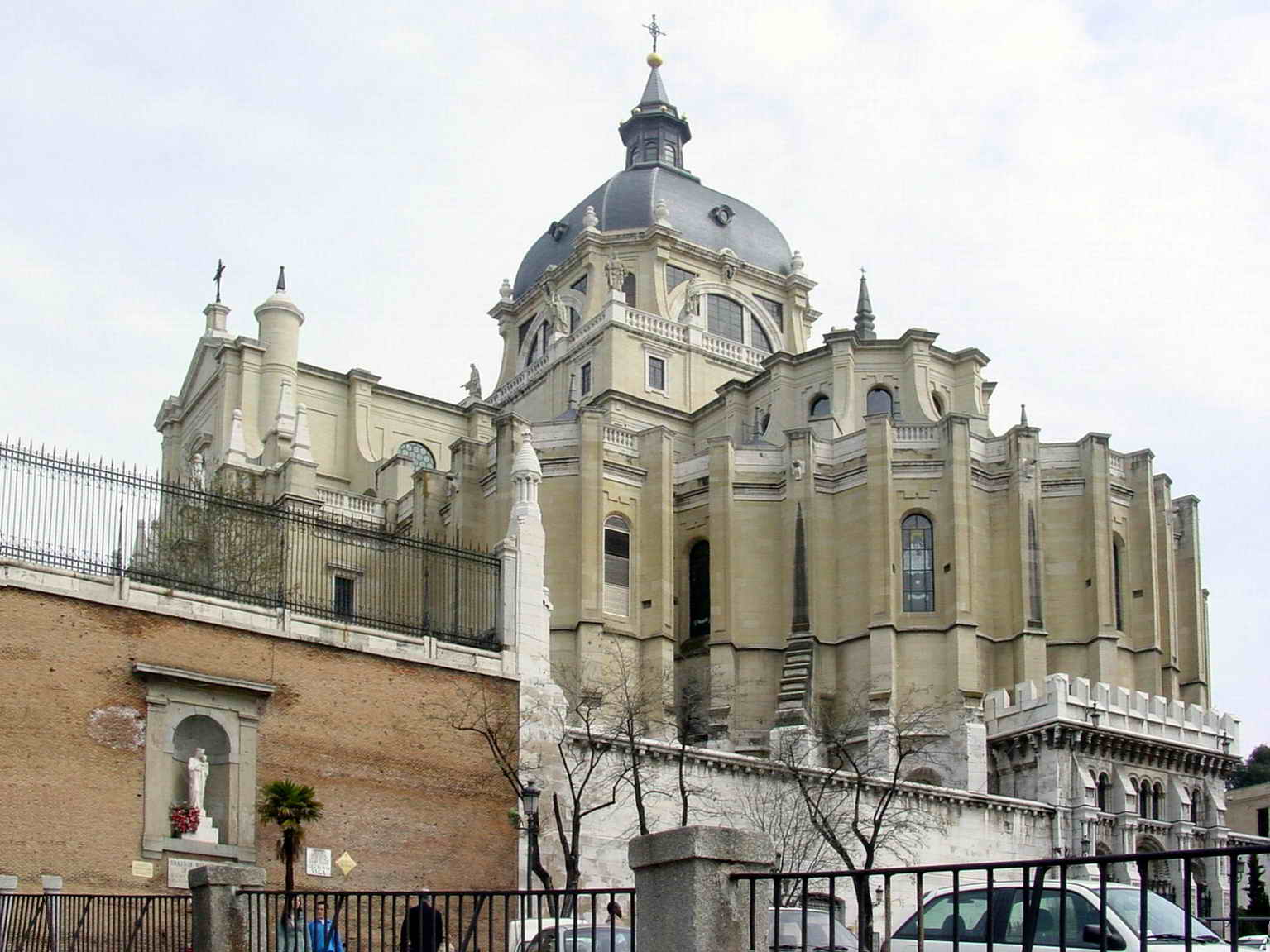 Madrid - Spain